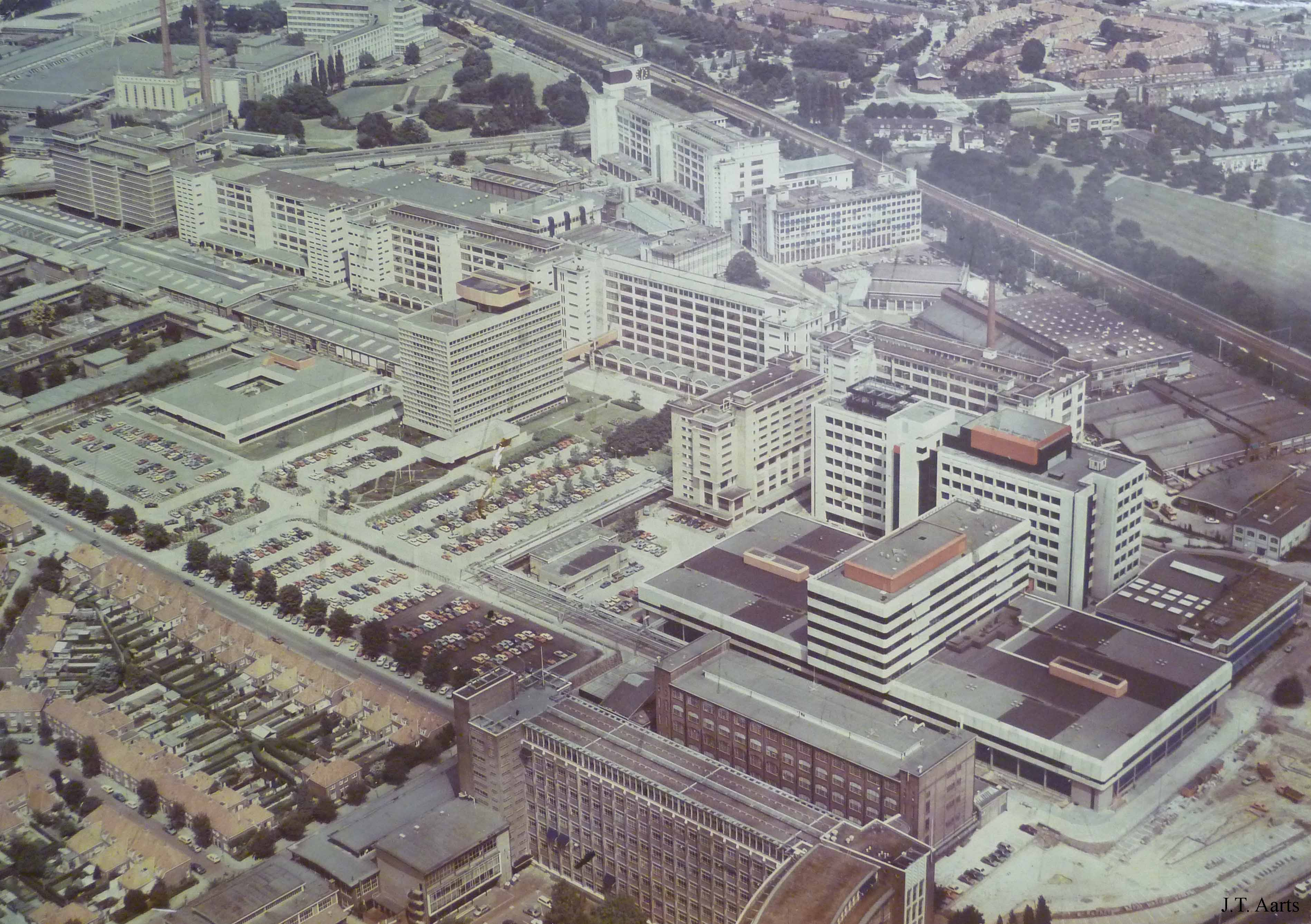 አማርኛ: year 1979